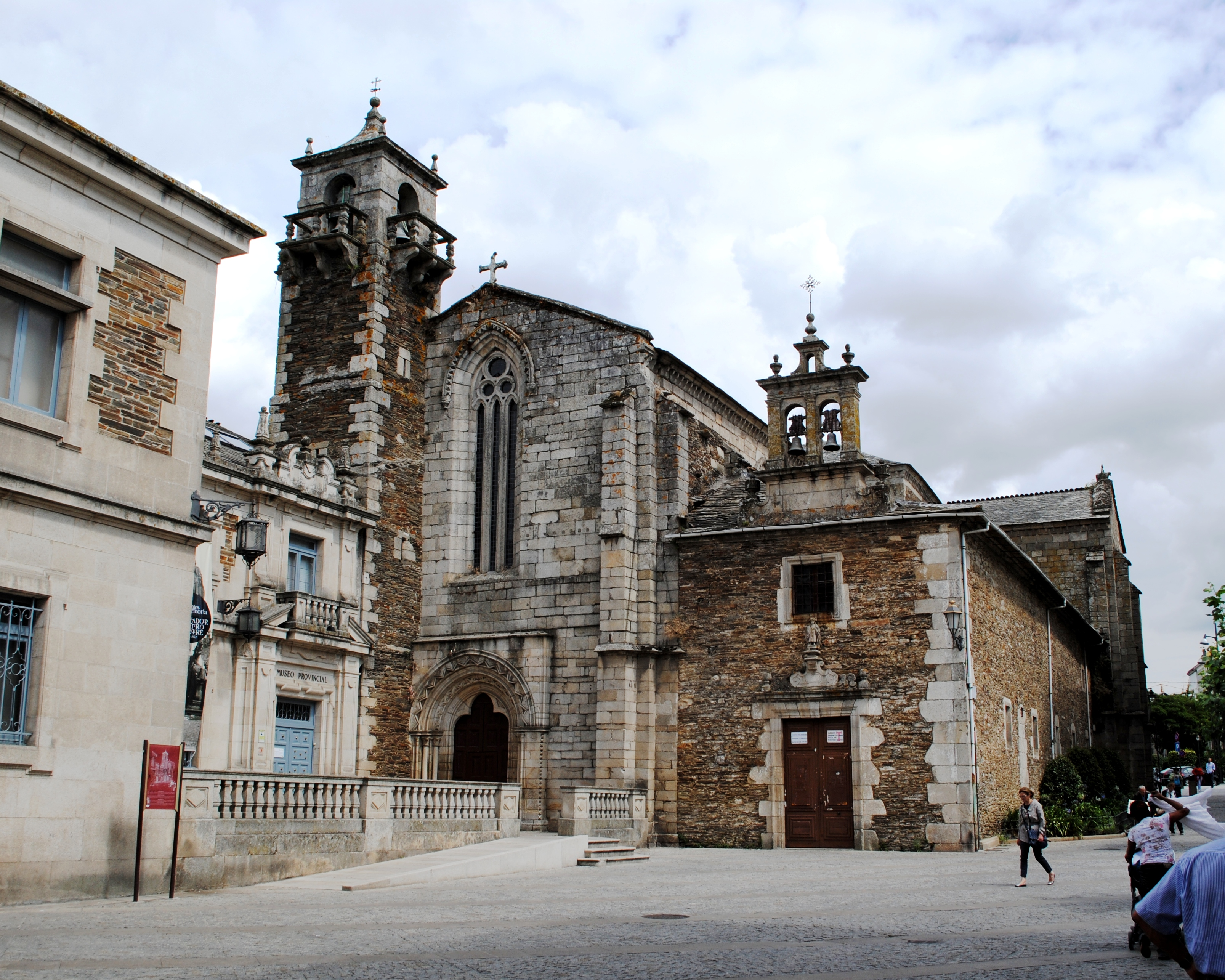 Igrexa parroquial de San Pedro, Lugo